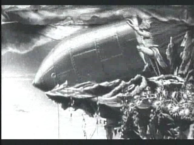 Méliès, viaggio nella luna (1902) 12